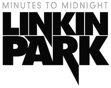 Minutes to midnight logo